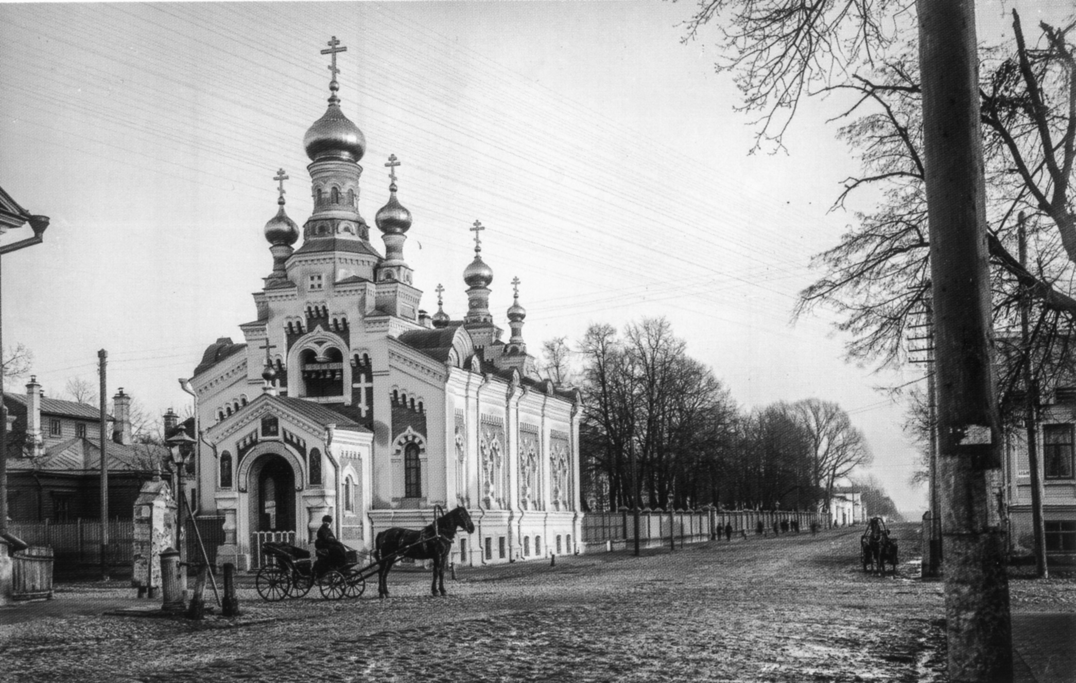 Скорбященская церковь в Нижнем Новгороде. Архивное фото